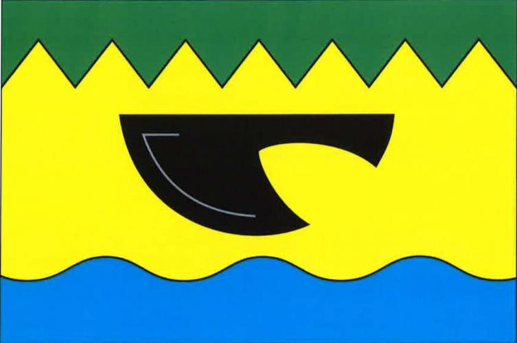 Vlajka, Soběšice, okres Klatovy